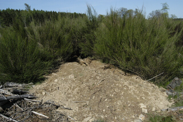 Meles meles den, from Commanster, Belgian High Ardennes (50°15'20``N,5°59'58``E)